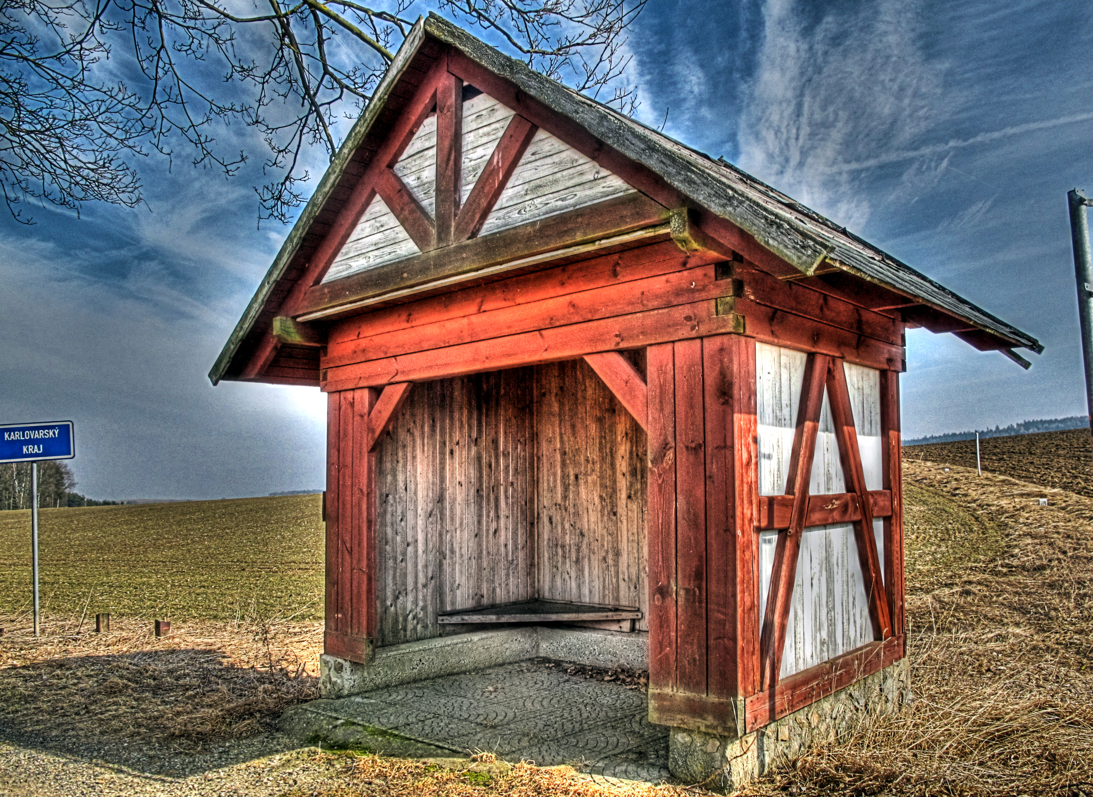 Deutschland, Bayern, Oberpfalz, Neualbenreuth, Schutzhütte am Grenzübergang nach Tschechien